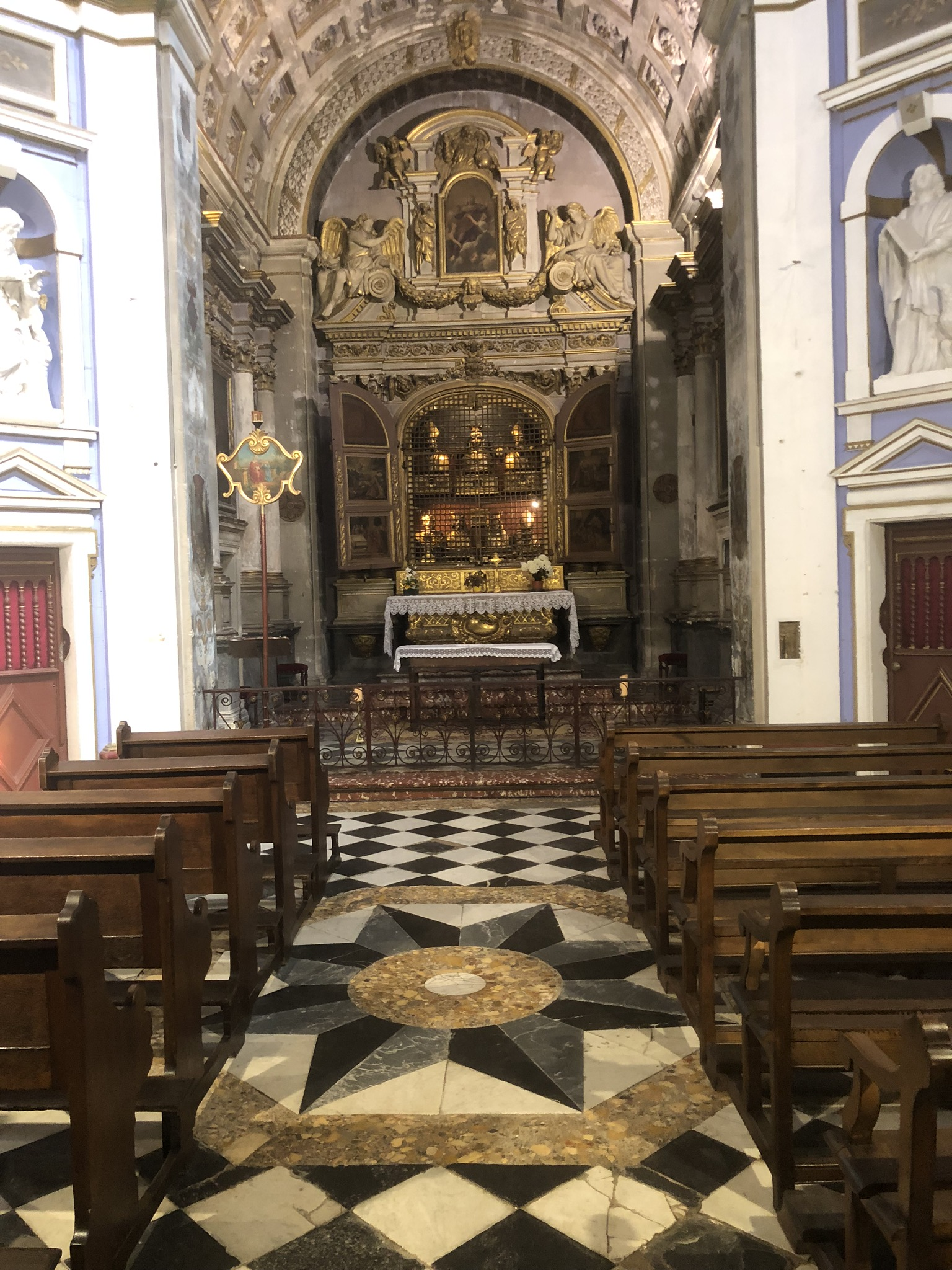 Kapelle mit Annareliquien in St. Anna, ehem. Kathedrale in Apt, Provence-Alpes-Côte, Frankreich